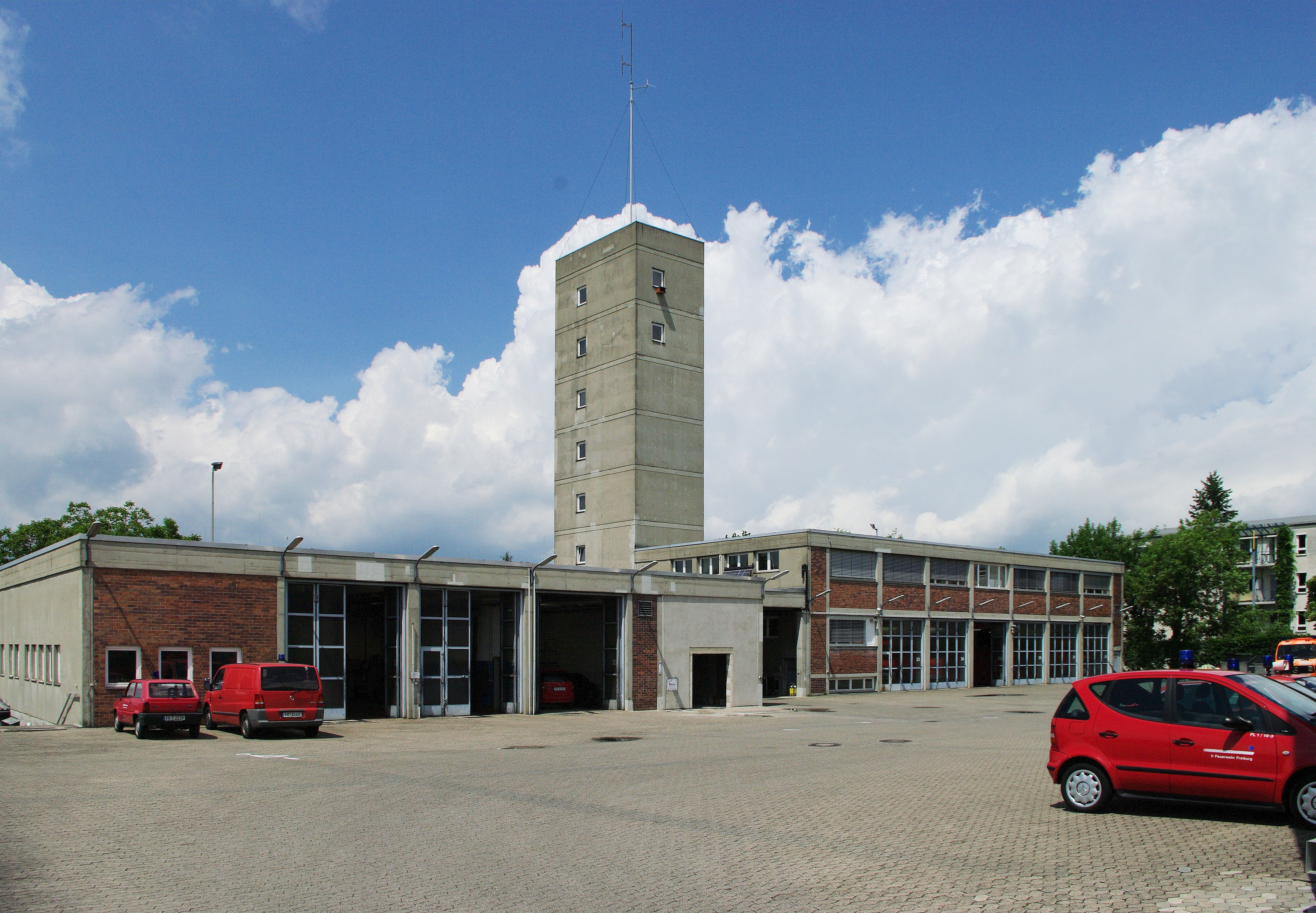 Hauptwache der BF Freiburg Schlauchturm und Betriebshof